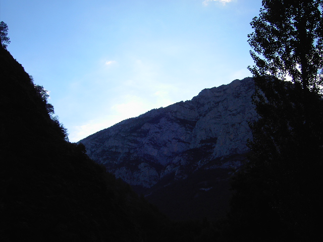 Entrada del Forato d'as Debotas durante un amanecer de verano. La montaña que se vé delante es la Punta Lierga por su ladera de boltorín, en la boca de la valle de Chistau.